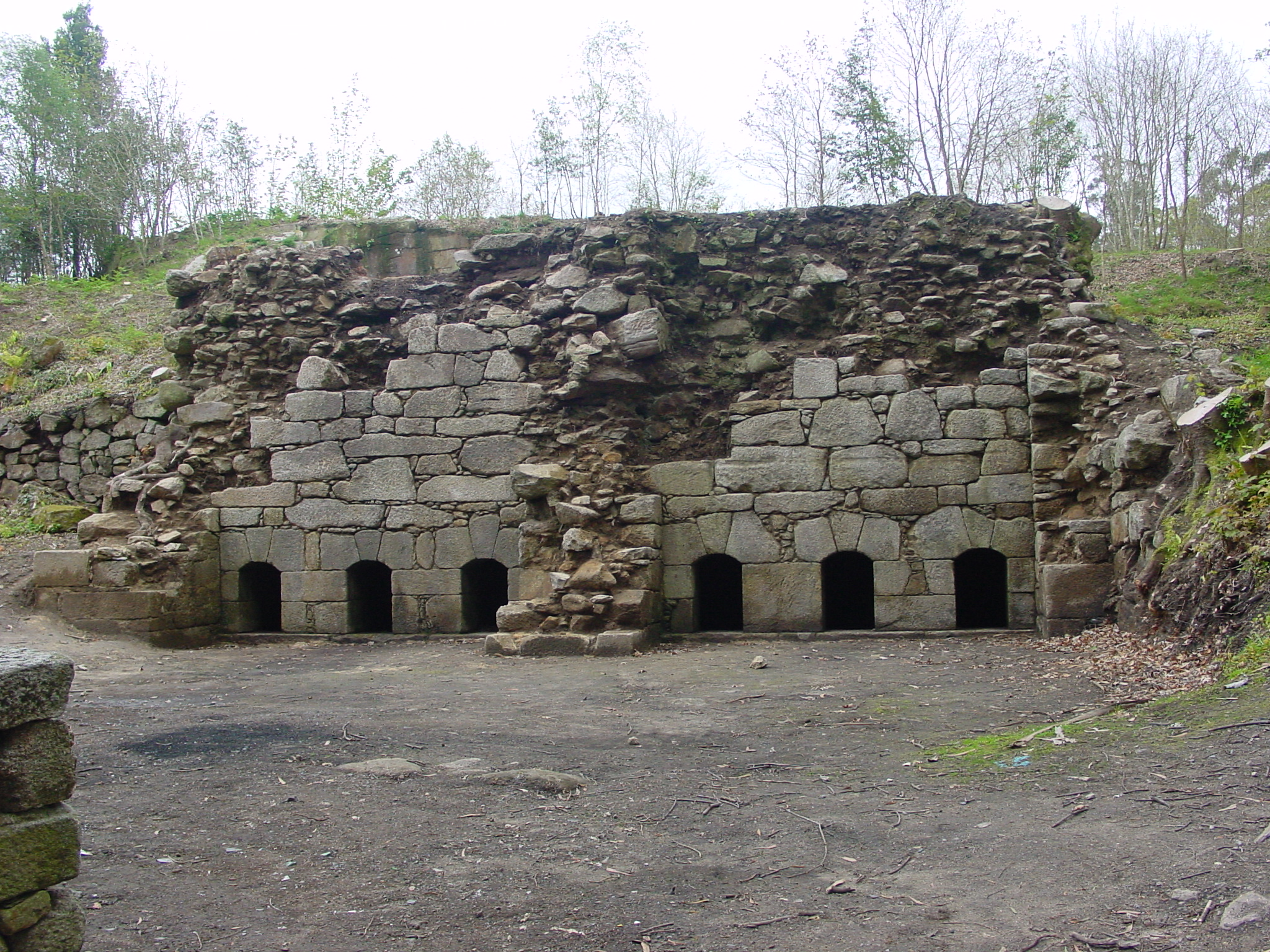 Restos del complejo siderúrgico de la fábrica de Sargadelos en Cervo (La Coruña, España).